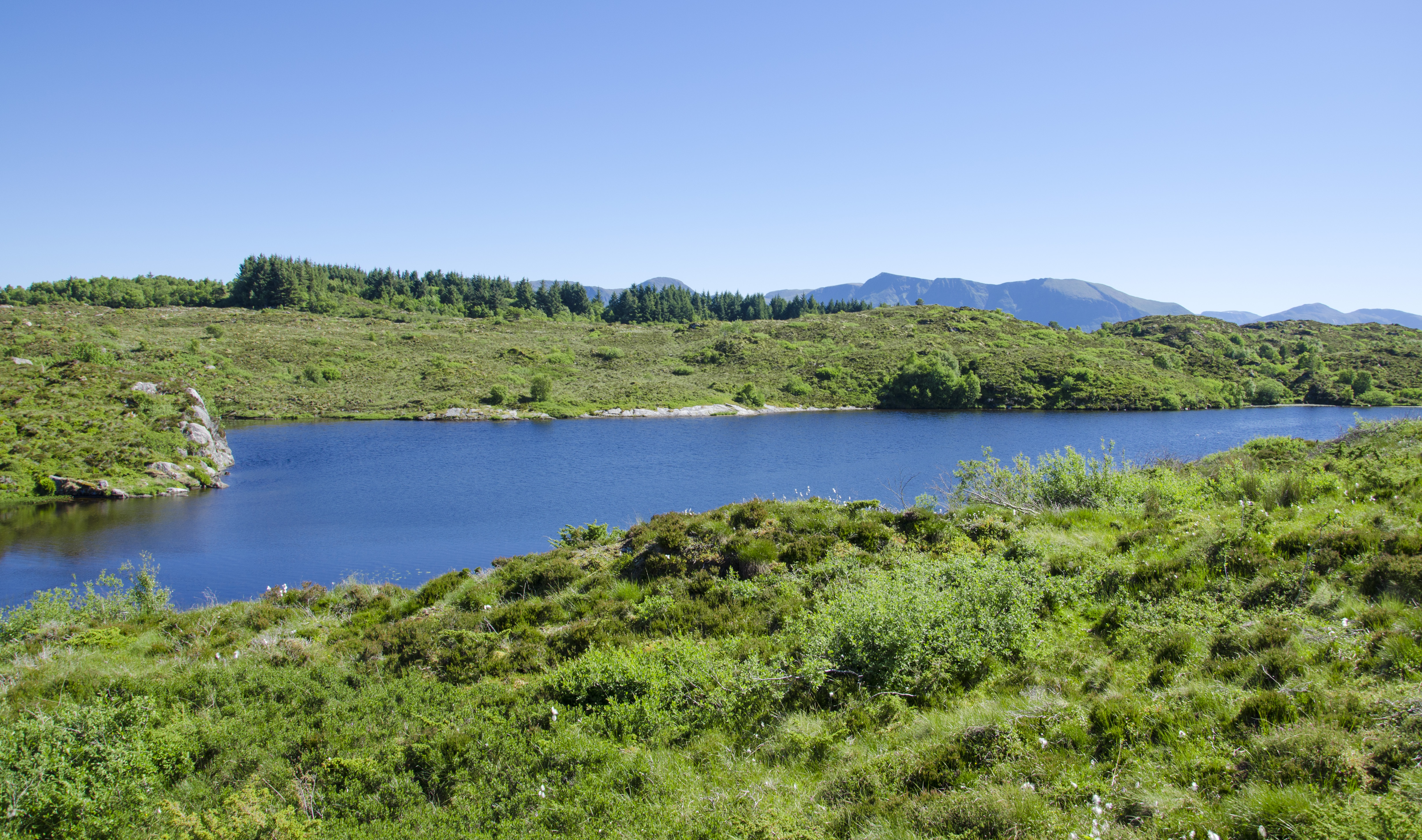 Smågevatnet, et vann på øya Gossen i Aukra, Møre og Romsdal